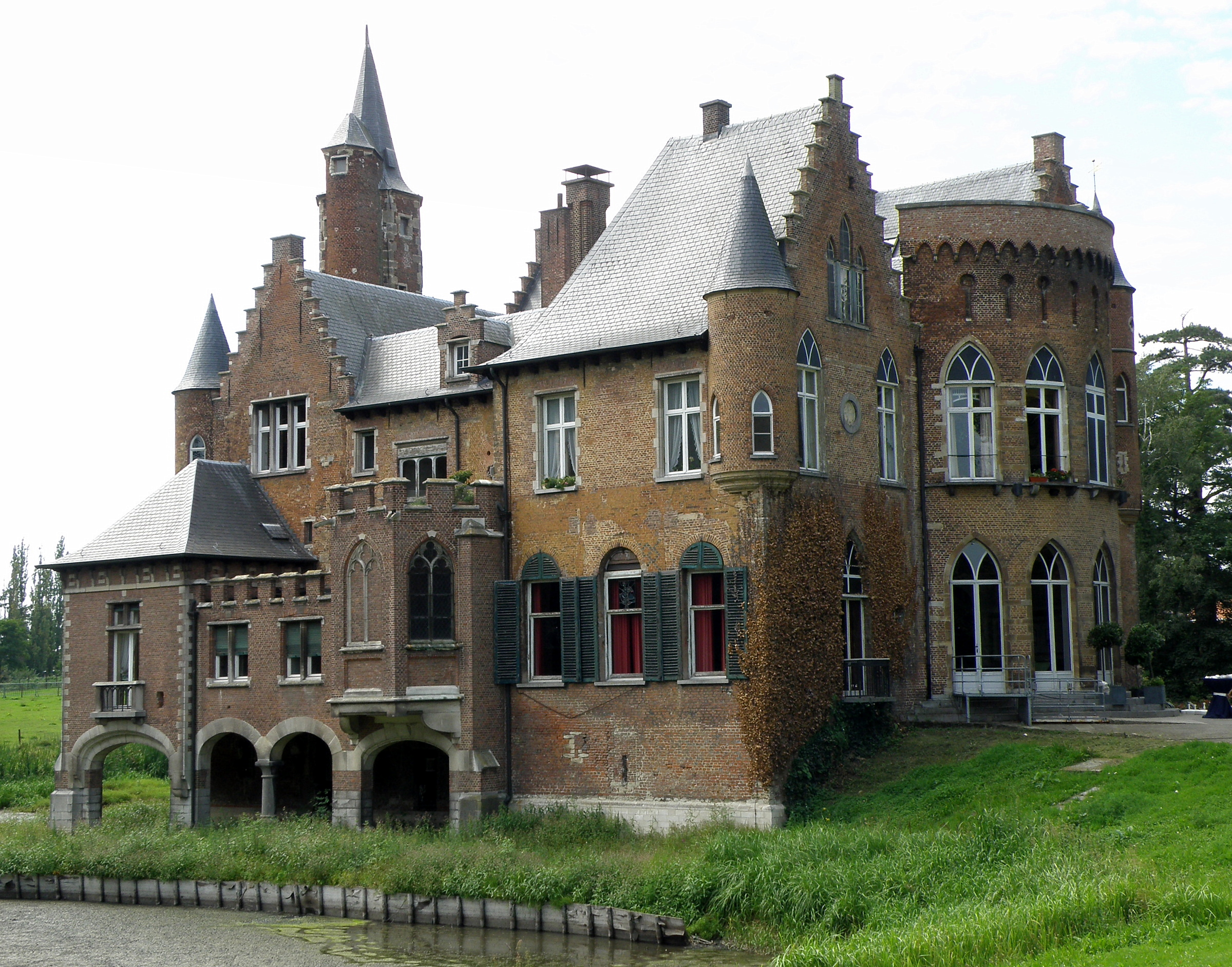 Bazel (gem. Kruibeke, prov. Oost-Vlaanderen, België). Kasteel van Wissekerke: oostgevel (links) en noordgevel (rechts).